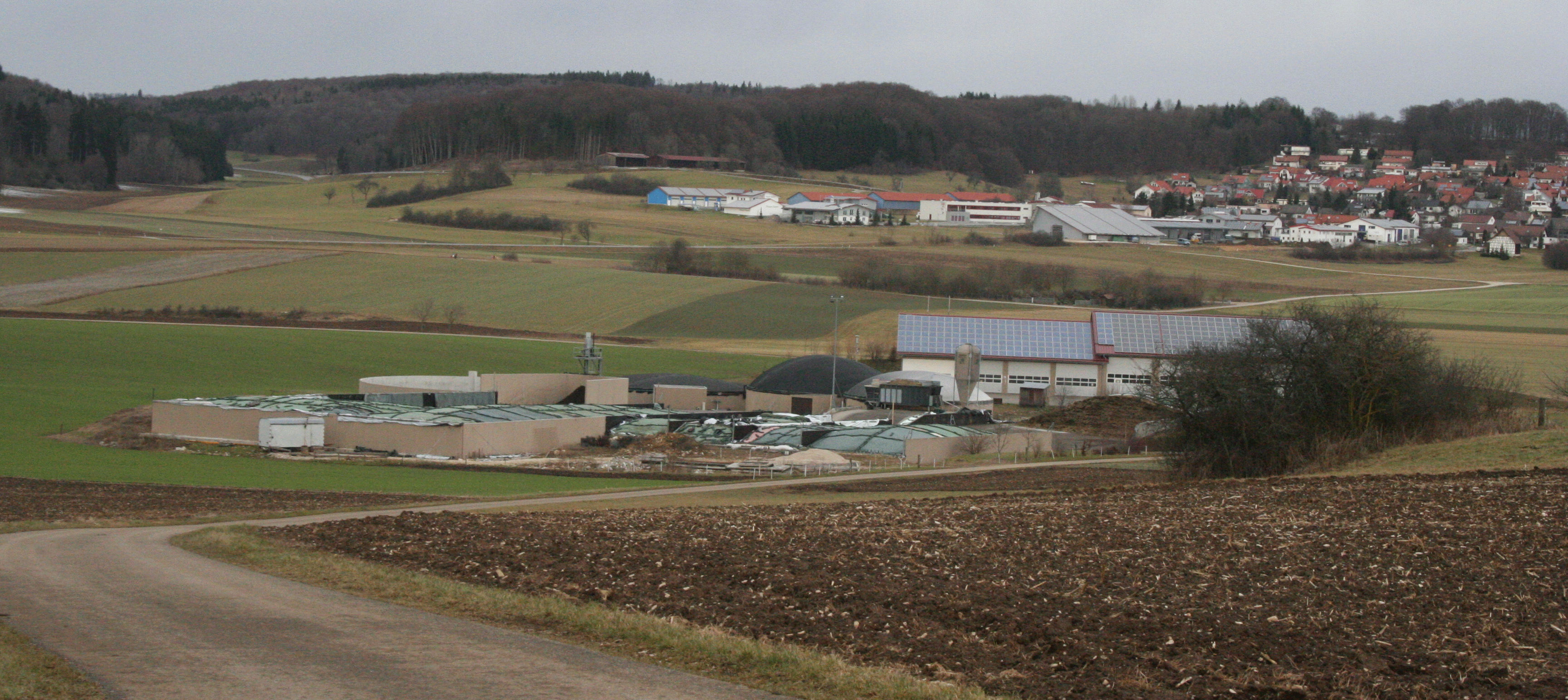 Biogasanlage auf der Gemarkung Upfingens am "Bloasa Berg"